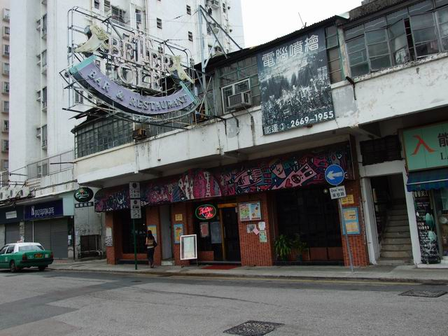 聯和墟的舊建築物